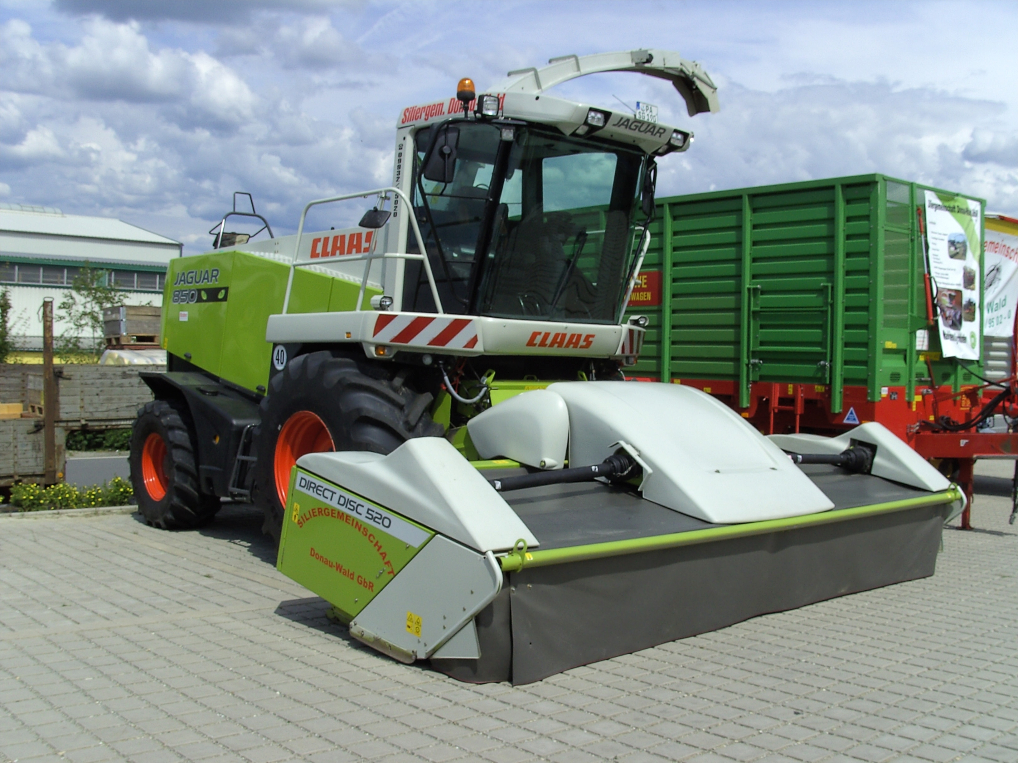 Claas Jaguar 850 mit Direktschneidwerk-Vorsatz Direct Disc 520 auf einer Ausstellung.